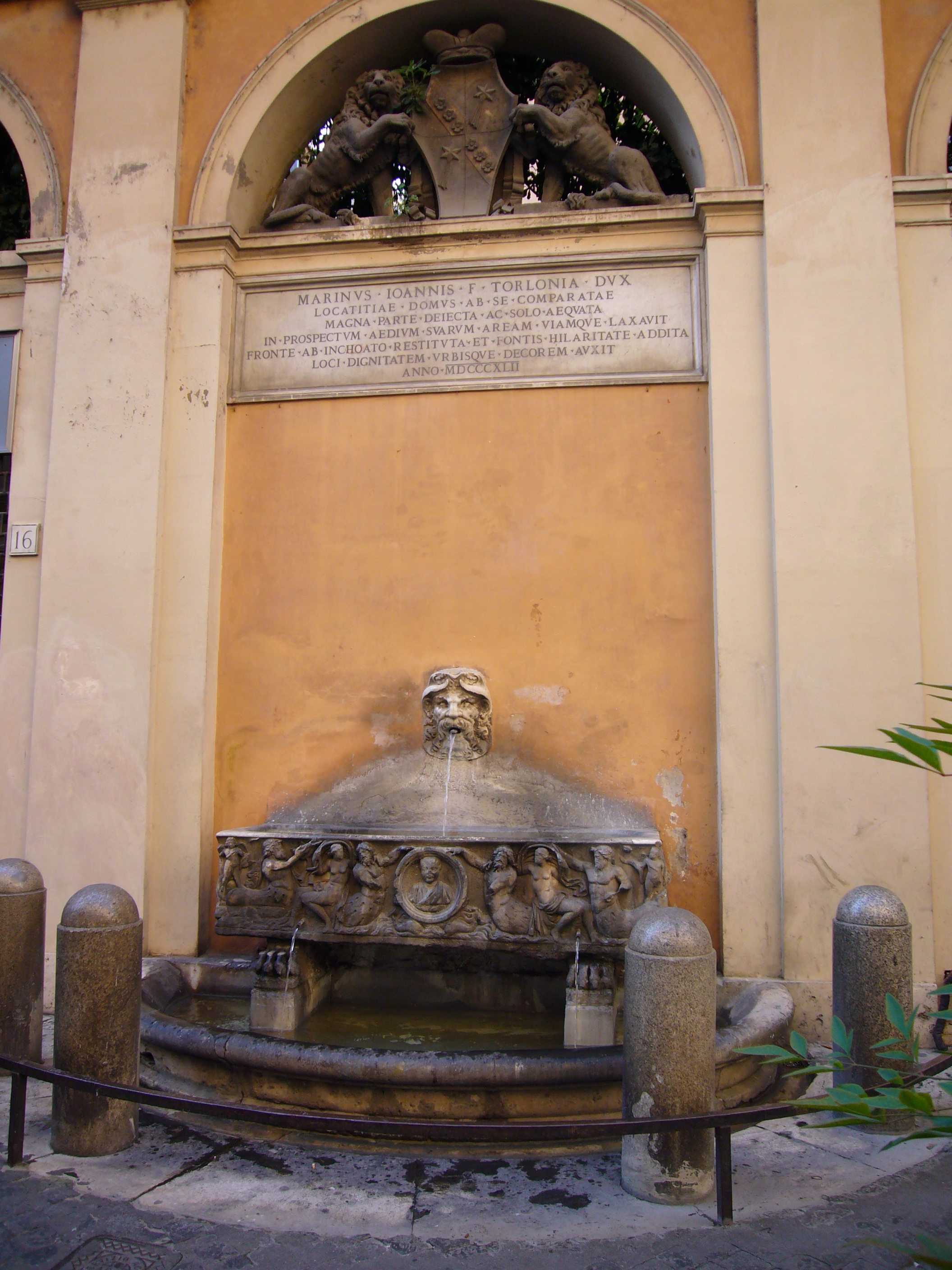 Roma, via Bocca di Leone (Campo Marzo): Fontana Torlonia. Alla base, un rilievo con tritoni e nereidi tratto da un sarcofago romano. In alto nella lunetta la corona ducale sovrasta lo stemma dei Torlonia affiancato da due leoni rampanti.